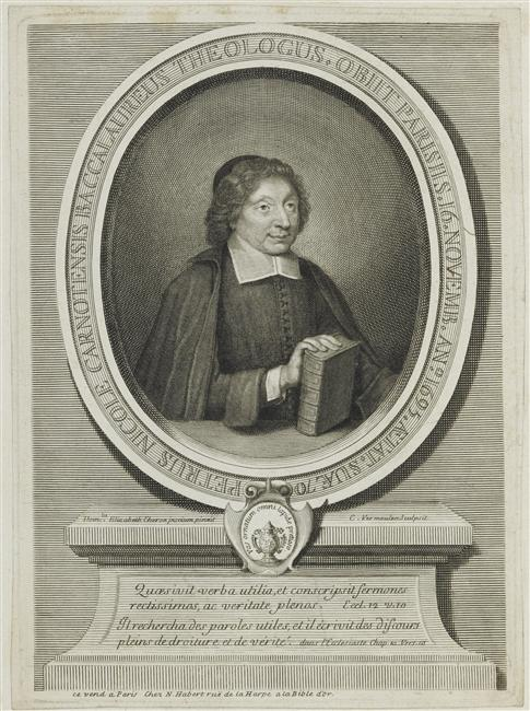 Portrait of Pierre Nicole